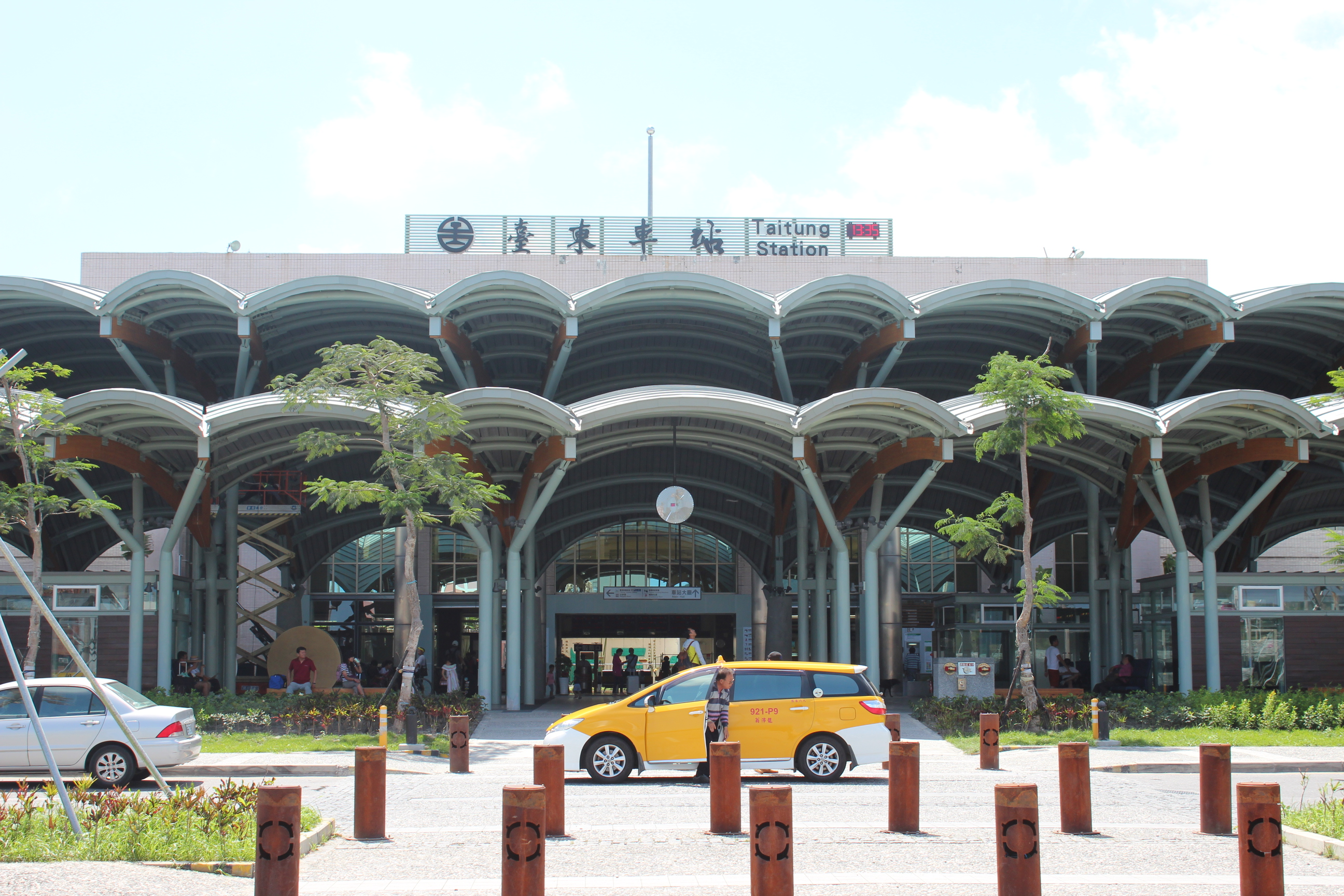 台湾鉄路管理局台東駅駅舎。